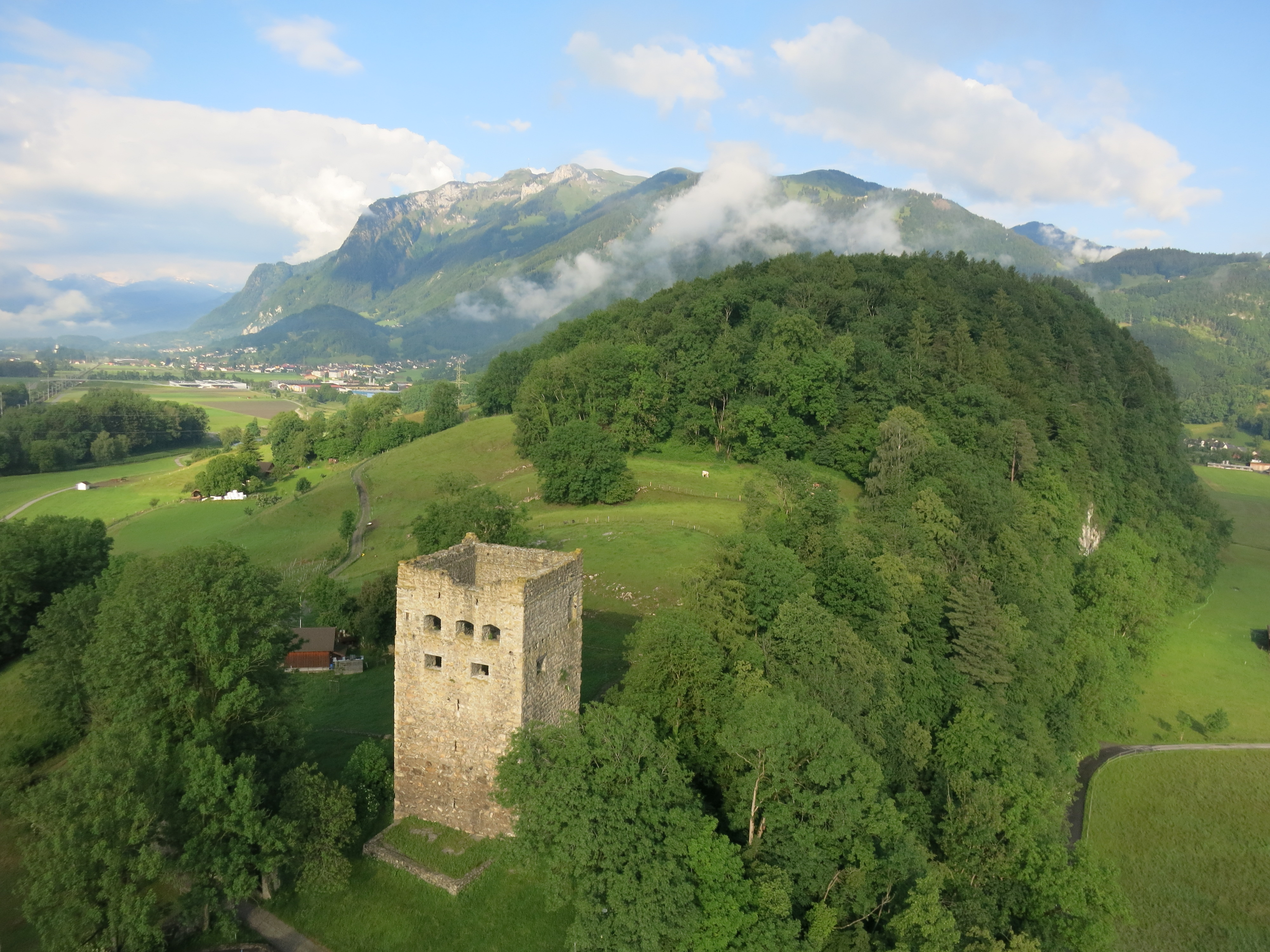 Diese Luftaufnahme zeigt die Burgruine Blatten in der Gemeinde Oberriet, Schweiz im St. Galler Rheintal.